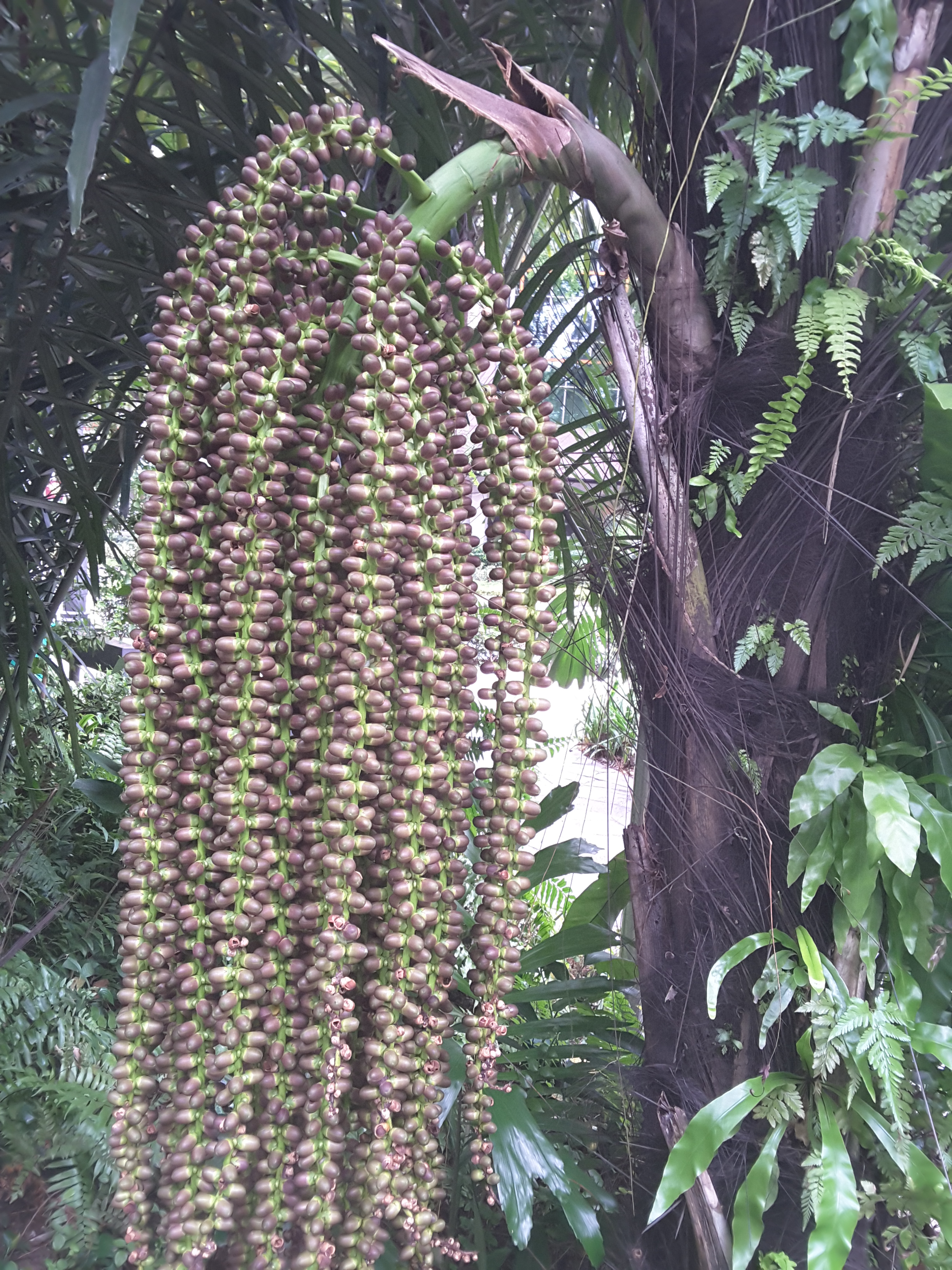 Arenga pinnata di Singapura Istana Park